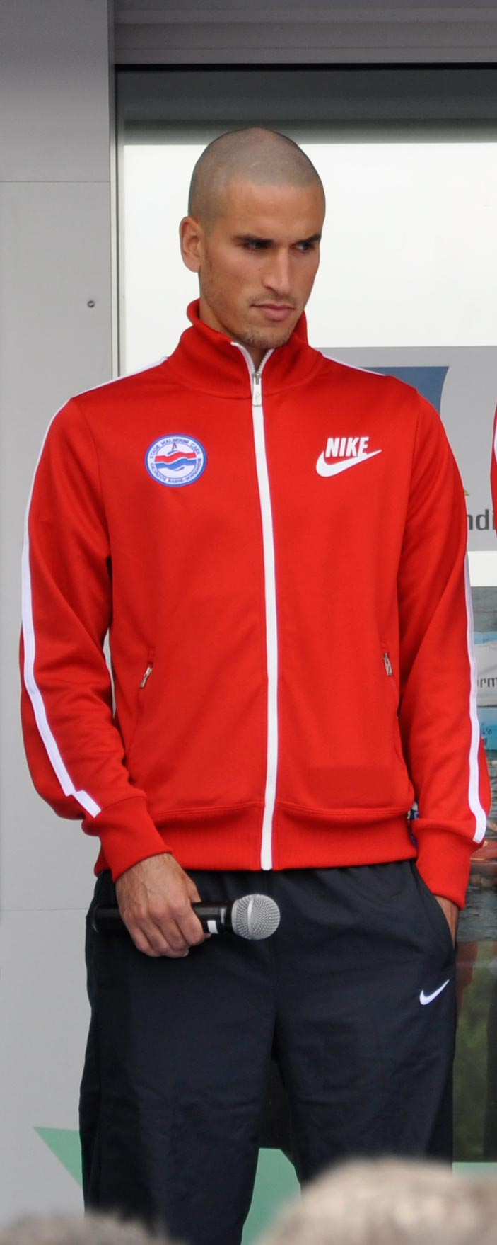 Jean Calvé lors de la présentation des recrues de Caen.